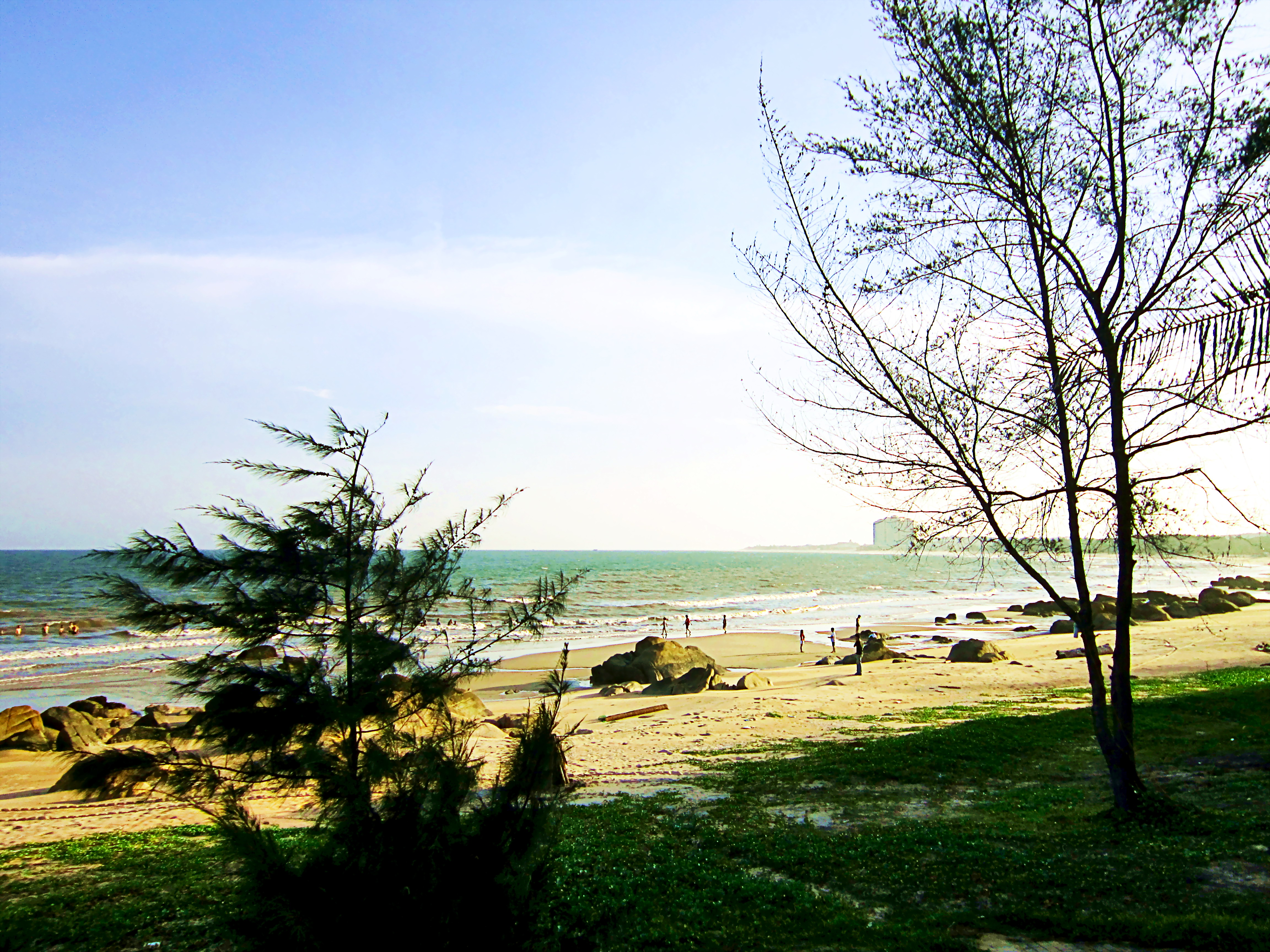 Biển ở Hồ Cóc, thuộc xã Bưng Riềng, huyện Xuyên Mộc, tĩnh Bà Rịa-Vũng Tàu, Việt Nam.